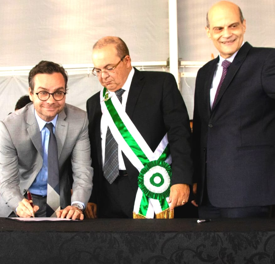 Sejus